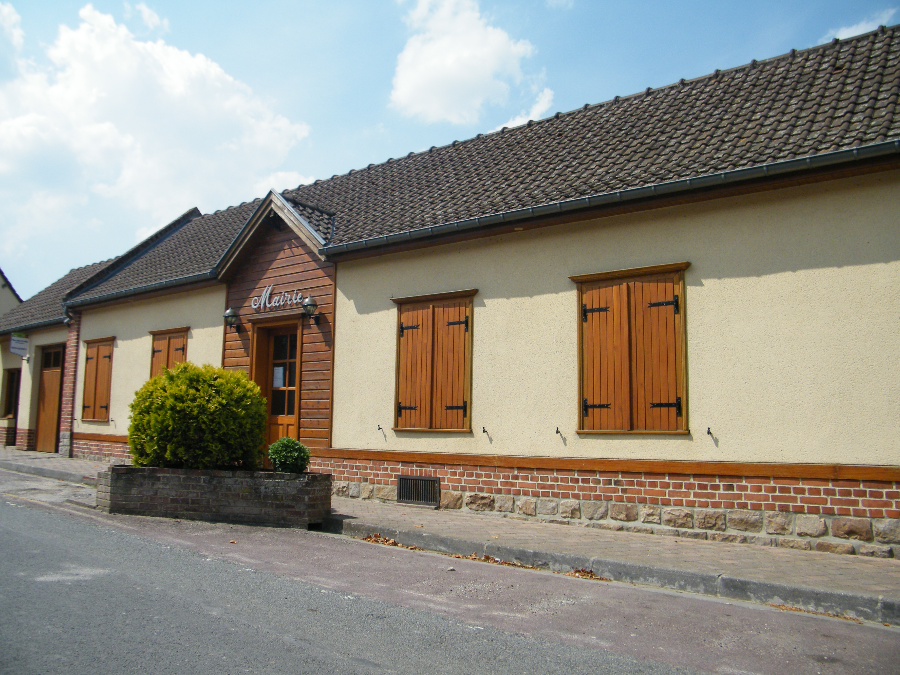 Mairie.